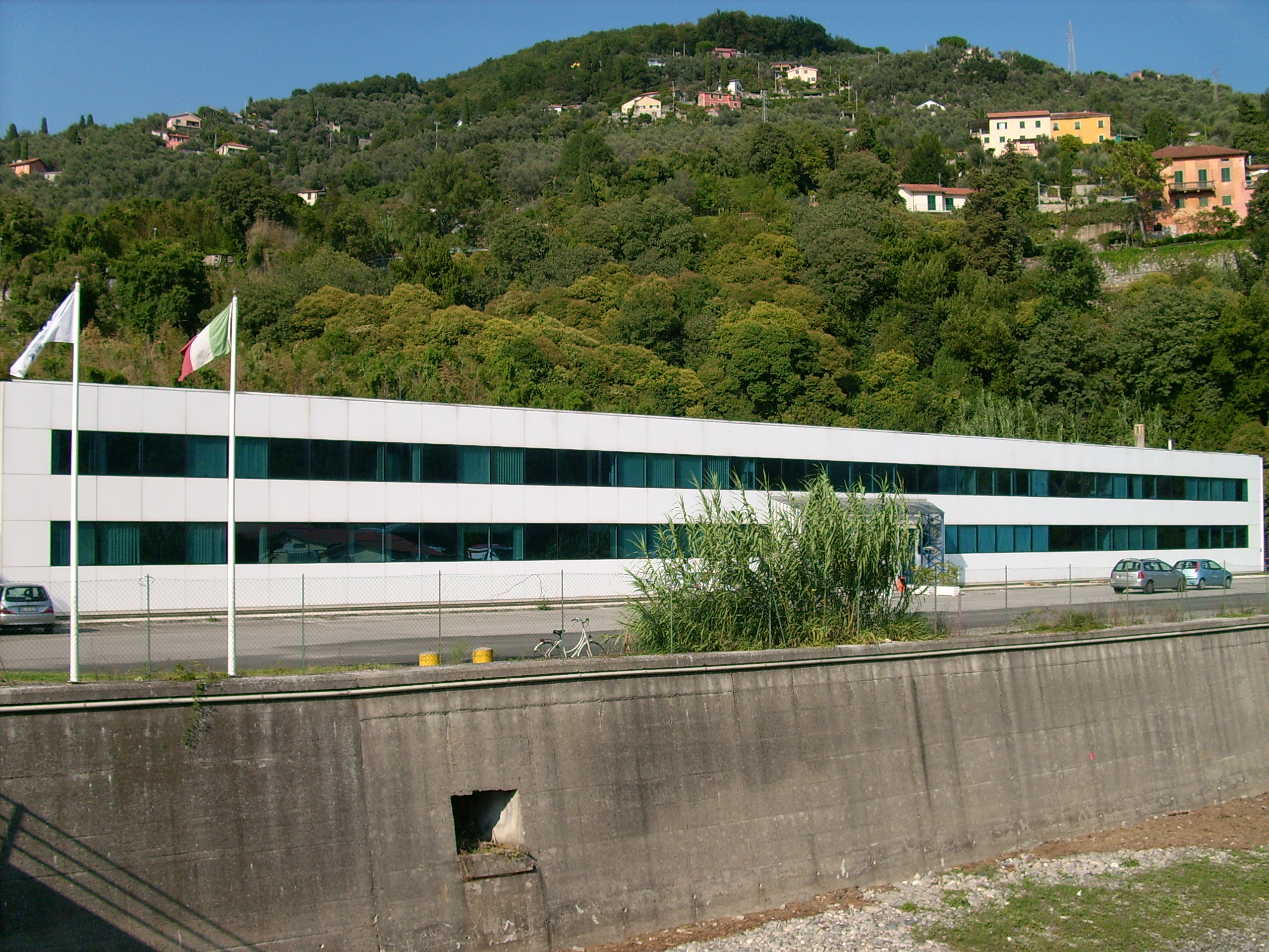 Stabilimento Azienda Mares di Rapallo, Liguria, Italia